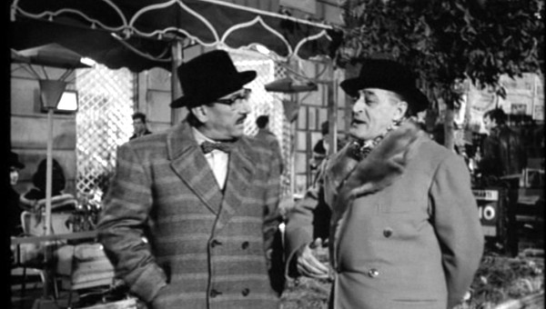 Totò e Peppino